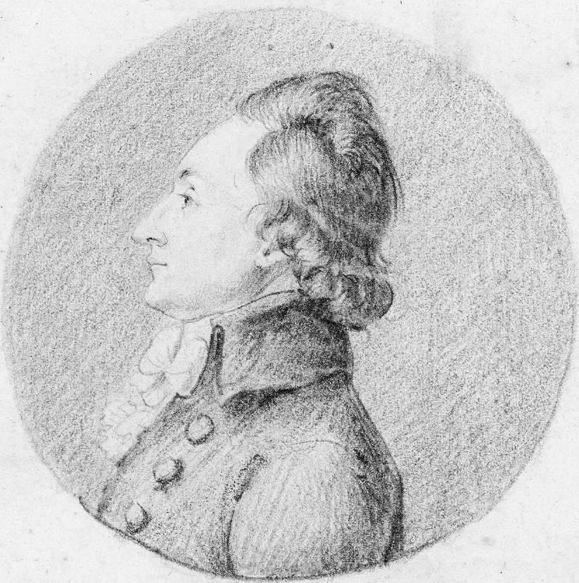 Portrait de Georges Bergasse de Laziroules (1763-1827) député du tiers aux États généraux le 8 avril 1789 et élu député de l'Ariège au Conseil des Cinq-Cents, le 24 germinal an VI.